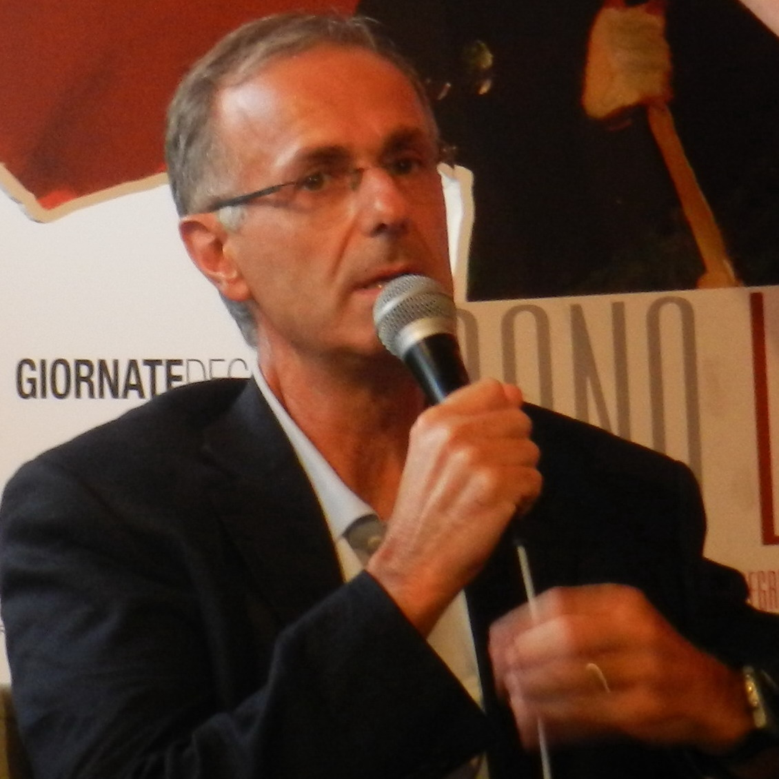 Marco Paolini, Roberto Citran Presentazione del film "Io sono Li" al 68° Festival del Cinema di Venezia